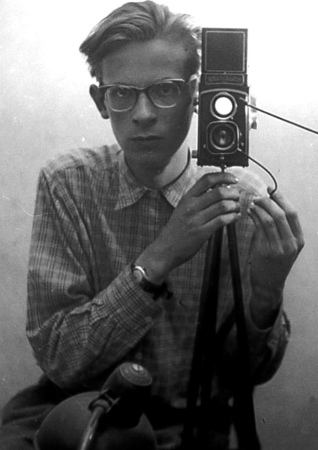 Diese noch undatierte Aufnahme aus dem Nachlass des Fotografen Jochen Mellin zeigt den Jugendlichen und späteren Fotojournalisten während eines Selbstbildnisses mit der von seinem Vater geschenkten zweiäugigen Spiegelreflex-Kamera Rolleiflex. Das Digitalisat wurde am 27. Juni 2017 erstmals vom Bildarchiv der Region Hannover (Signatur ARH NL Mellin) der Öffentlichkeit mit der Lizenz CC BY-SA 3.0 zur Verfügung gestellt ...